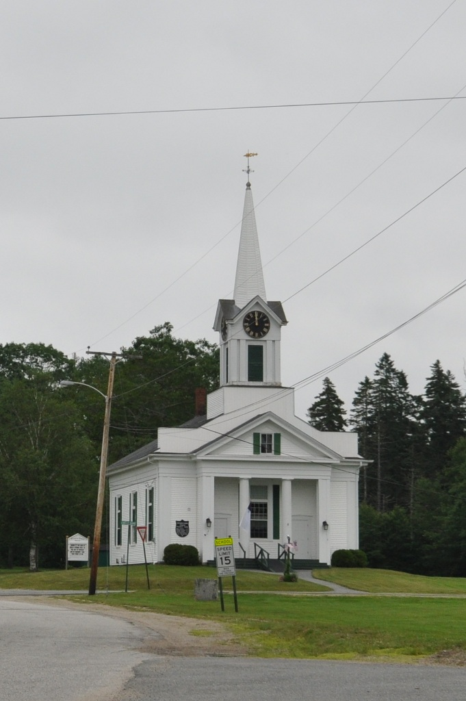 The Union Church in Steuben, Maine